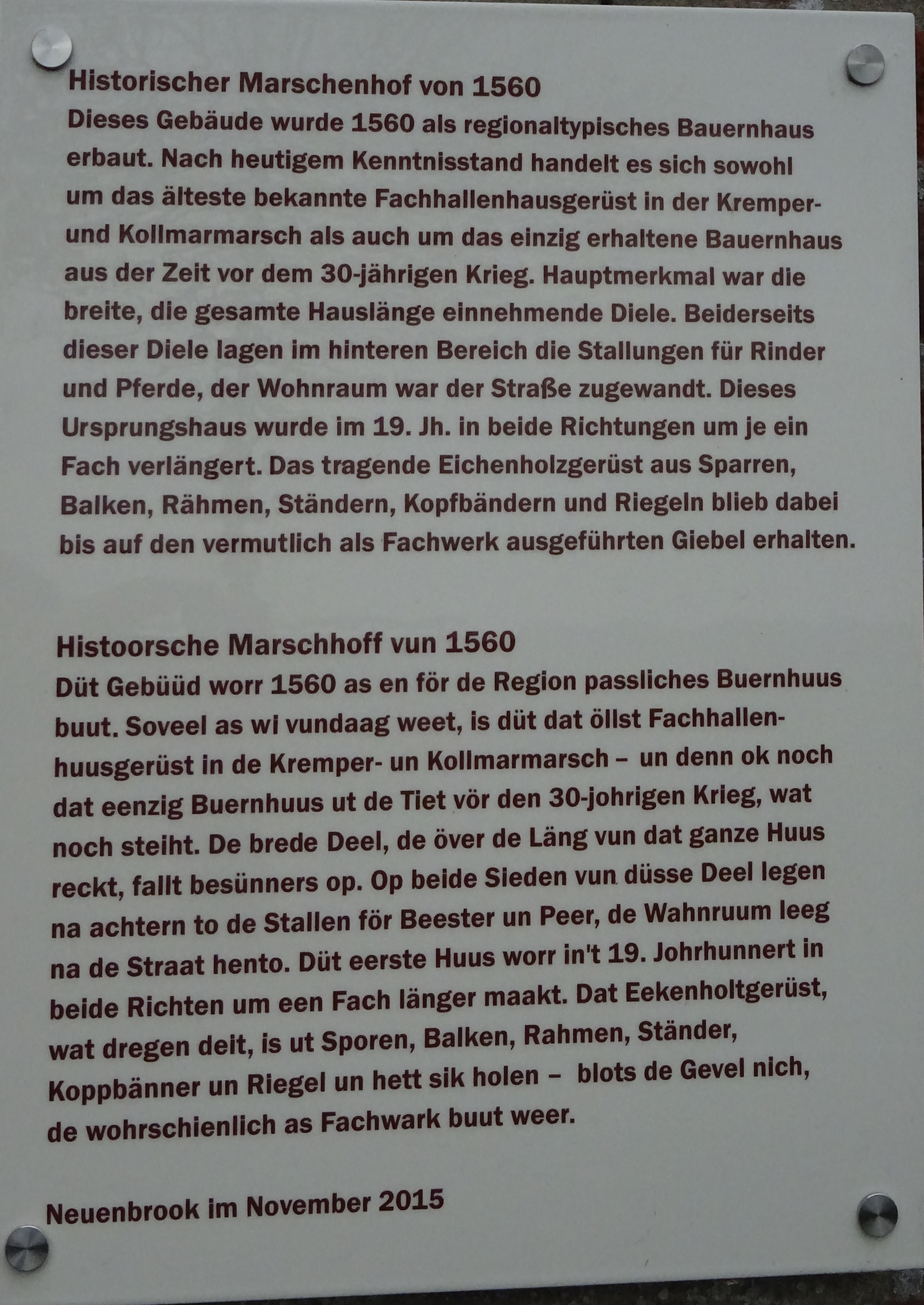 Tafel